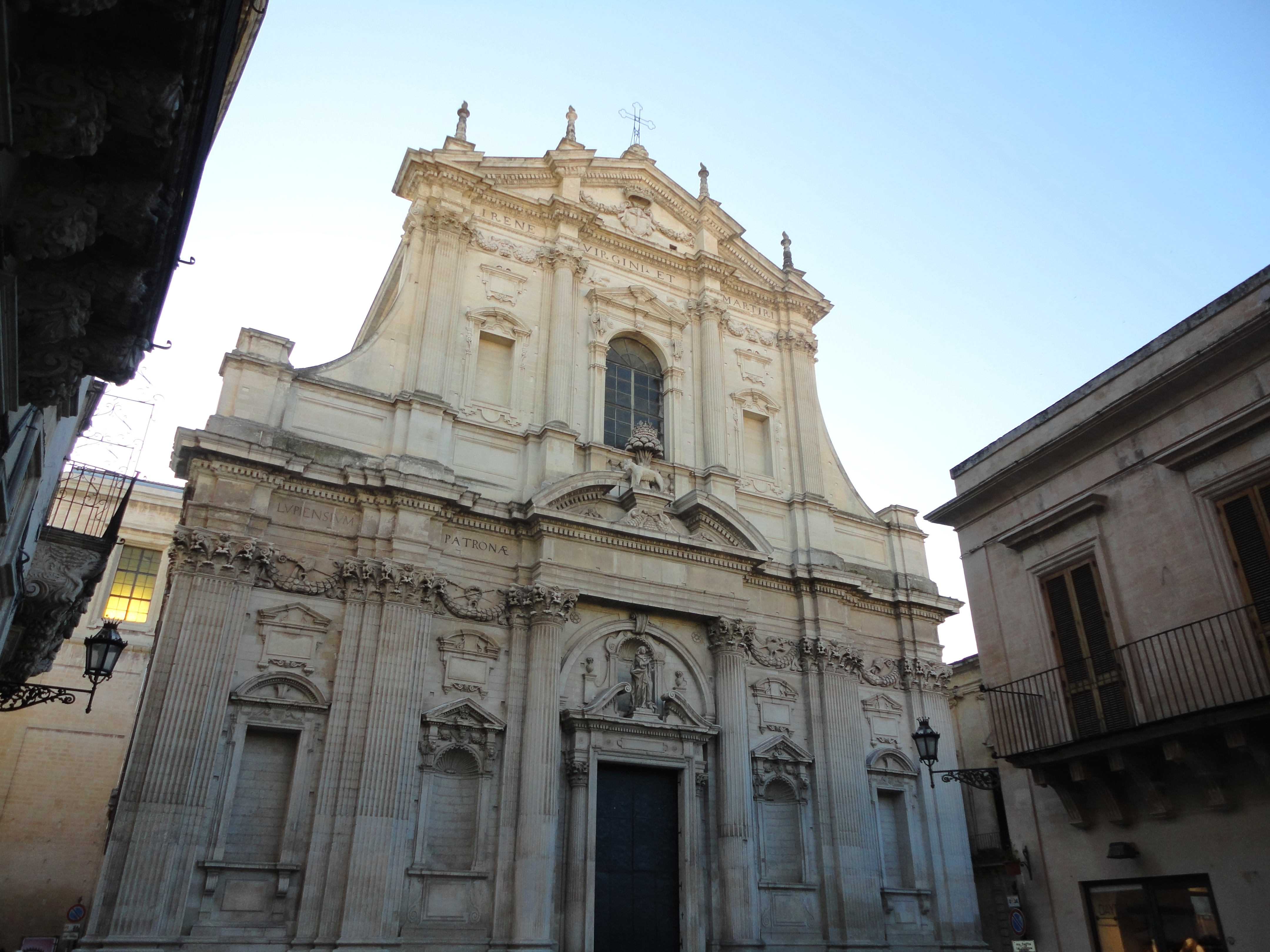 Lecce Chiesa di Sant'Irene dei Teatini